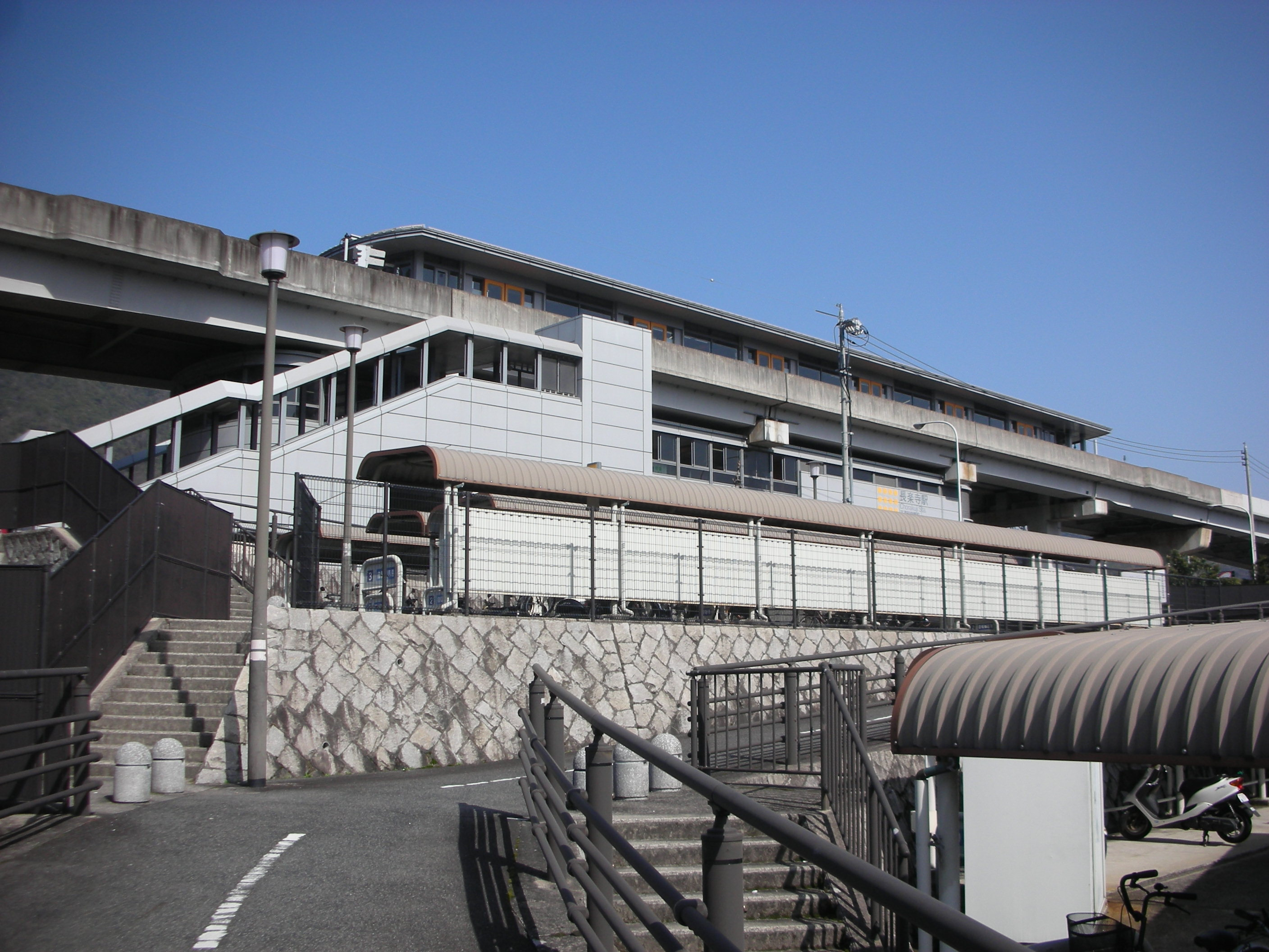 2009/2/15におんさき自身が撮影。アストラムライン長楽寺駅。